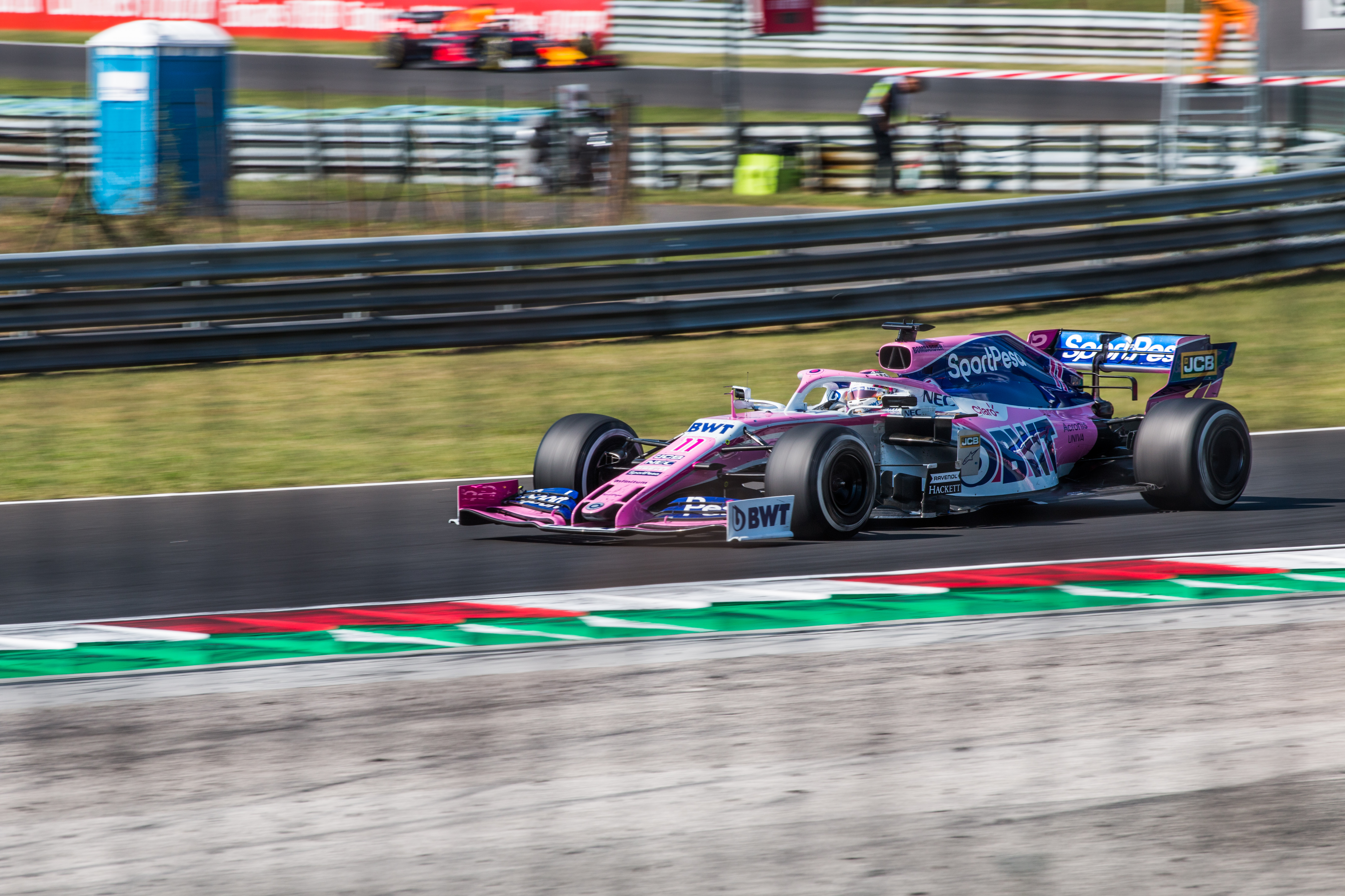 Sergio Perez in his Racing Point RP19 during Formula 1 Hungarian Grand Prix 2019 on the Hungaroring